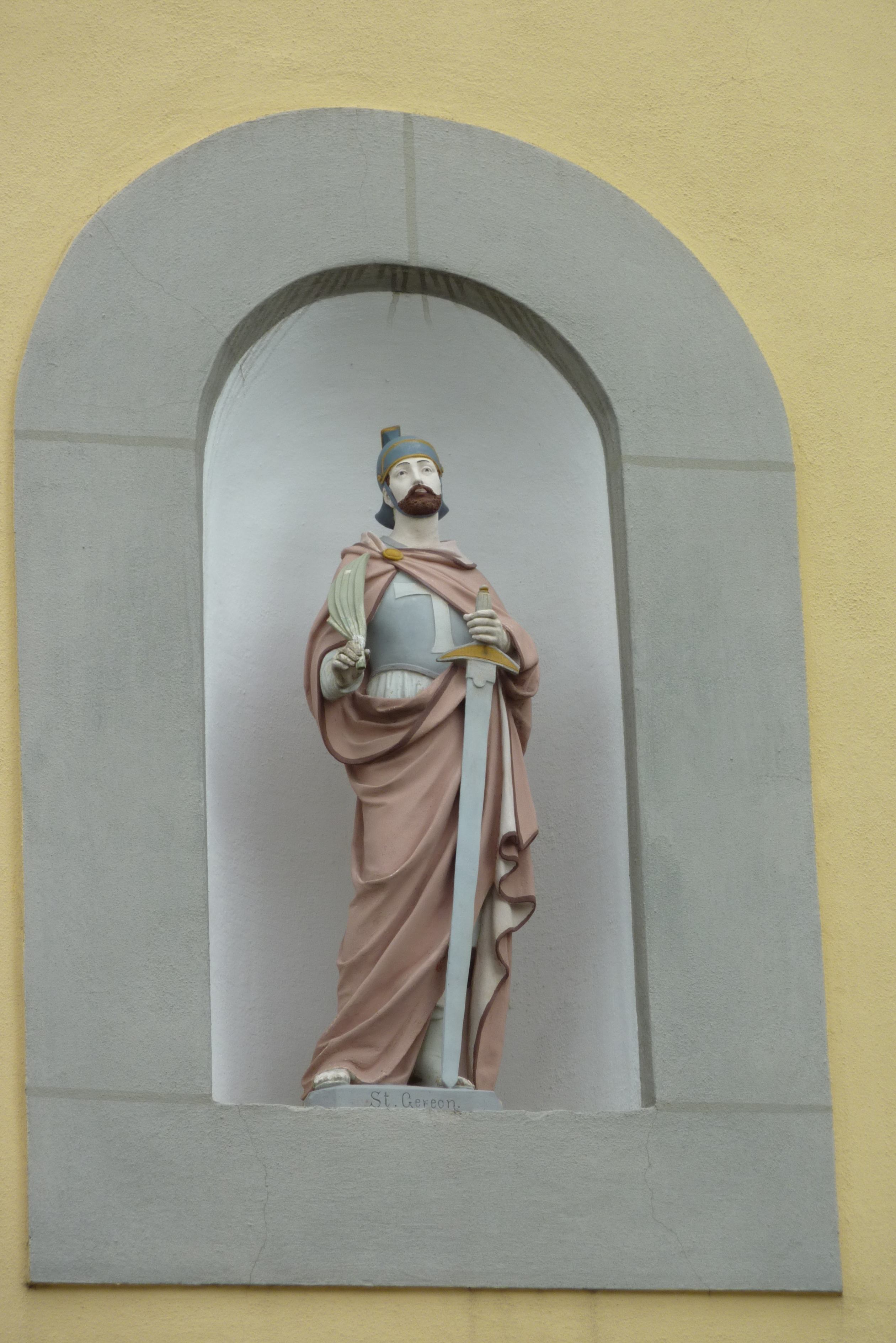 Berkum, Ortsteil von Wachtberg, Evangelische Kirche: Alte Kirche St. Gereon, Skulptur von St. Gereon